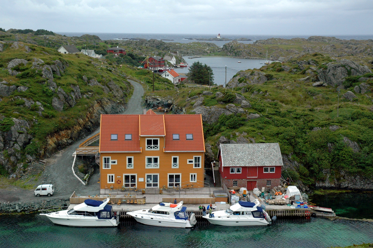 Røvær Kulturhotell ligger idyllisk og lunt ved Sandsund på øya Urd. Hotellet stod ferdig sommeren 2005 og drives av tre entusiastiske jenter. Bak i bildet sees Suggevågen og Røværholmen fyr.